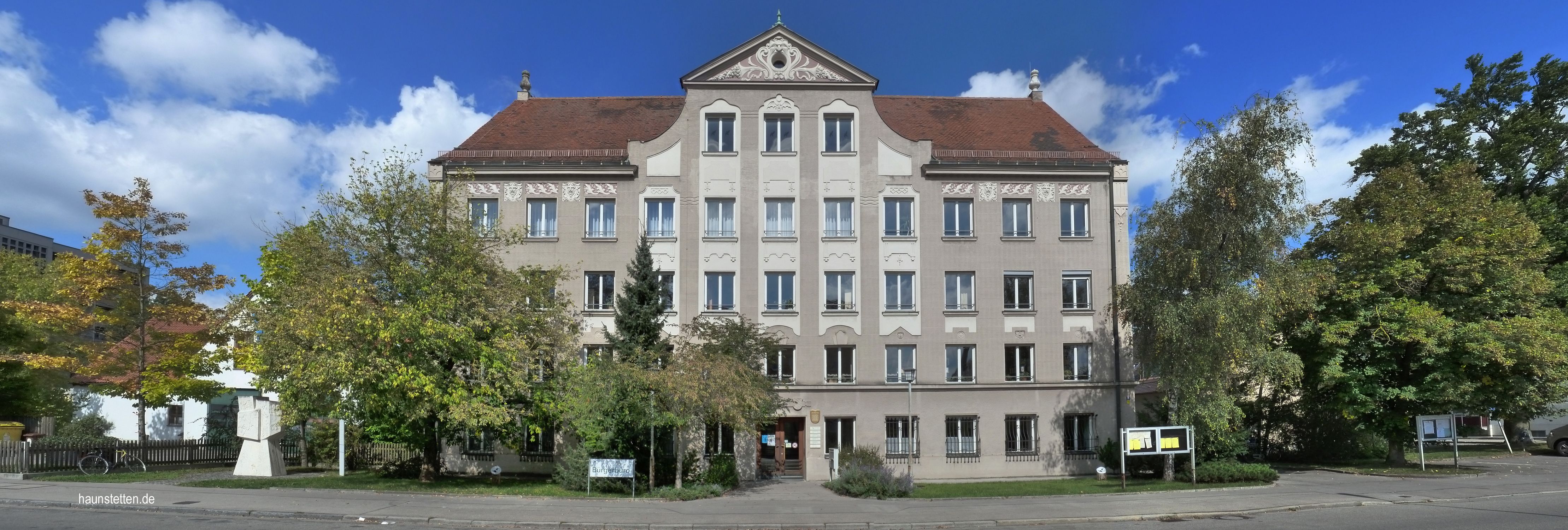 ehem. Rathaus in Haunstetten